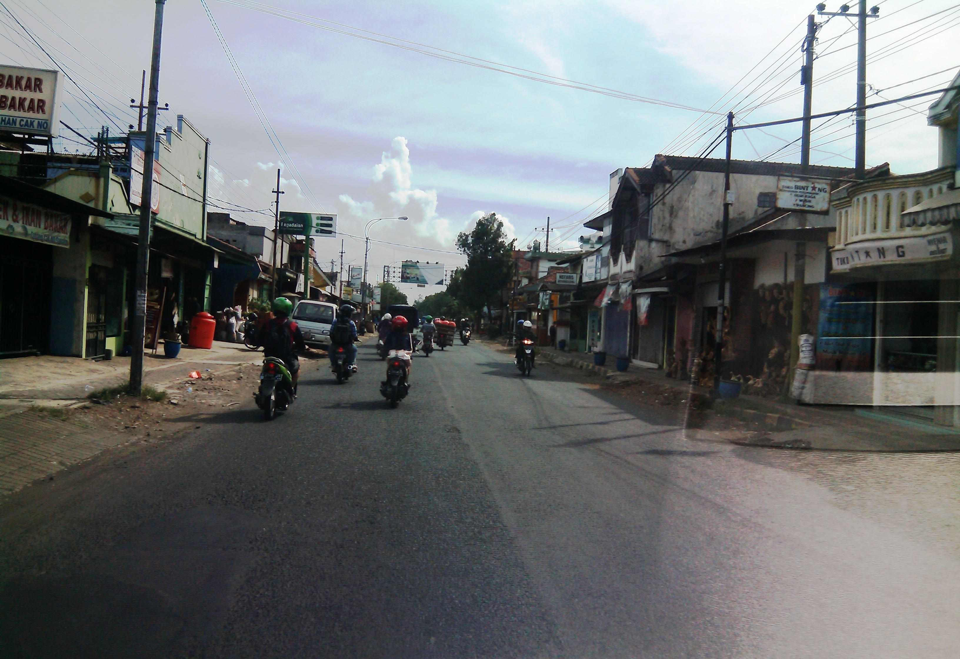 Jalan Raya Kebonagung, Pakisaji, Kabupaten Malang